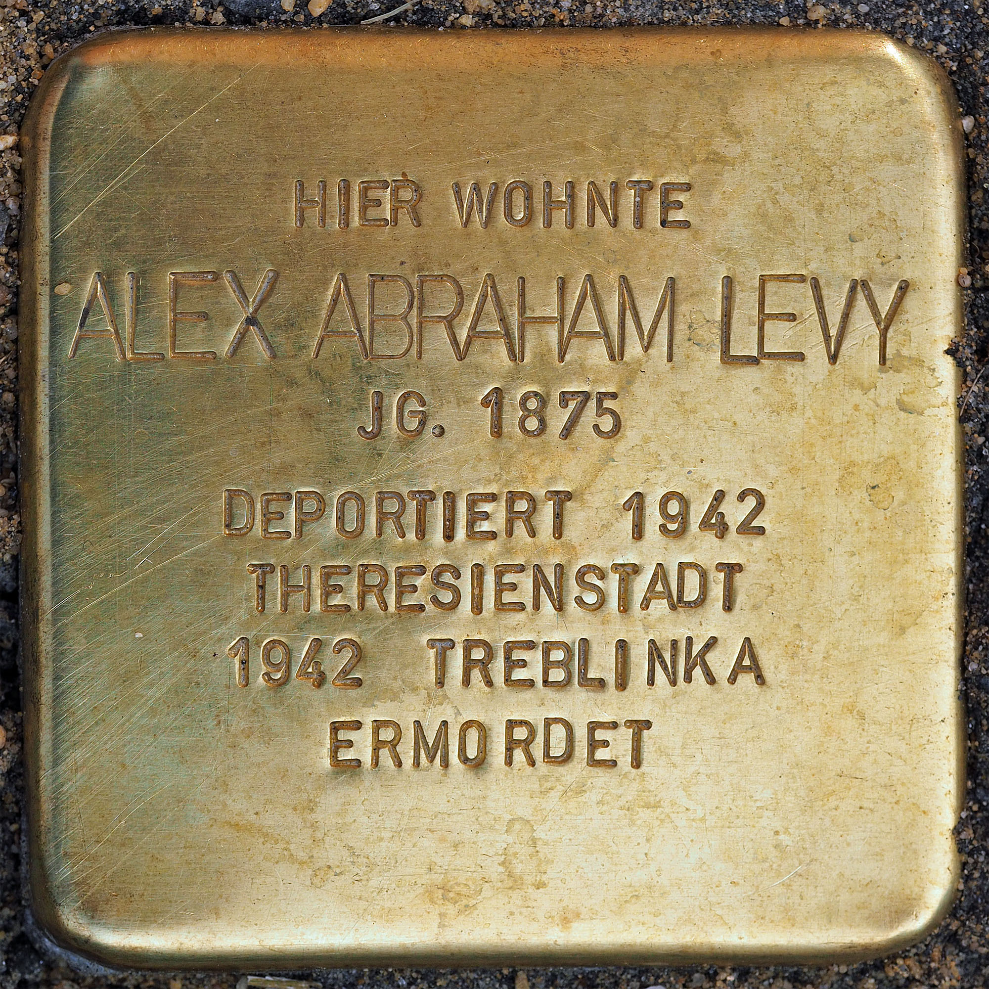 Stolpersteine Schwalmtal: Alex Levy